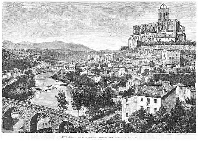 Vista de la ciudad de Manresa, tomada desde el puente viejo.